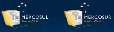 Logo do Boletín Oficial del Mercosur/Boletin Oficial do Mercosul.